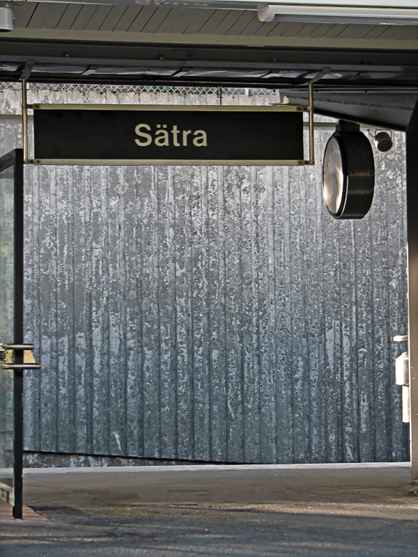 Sätra subway station in Stockholm, Sweden